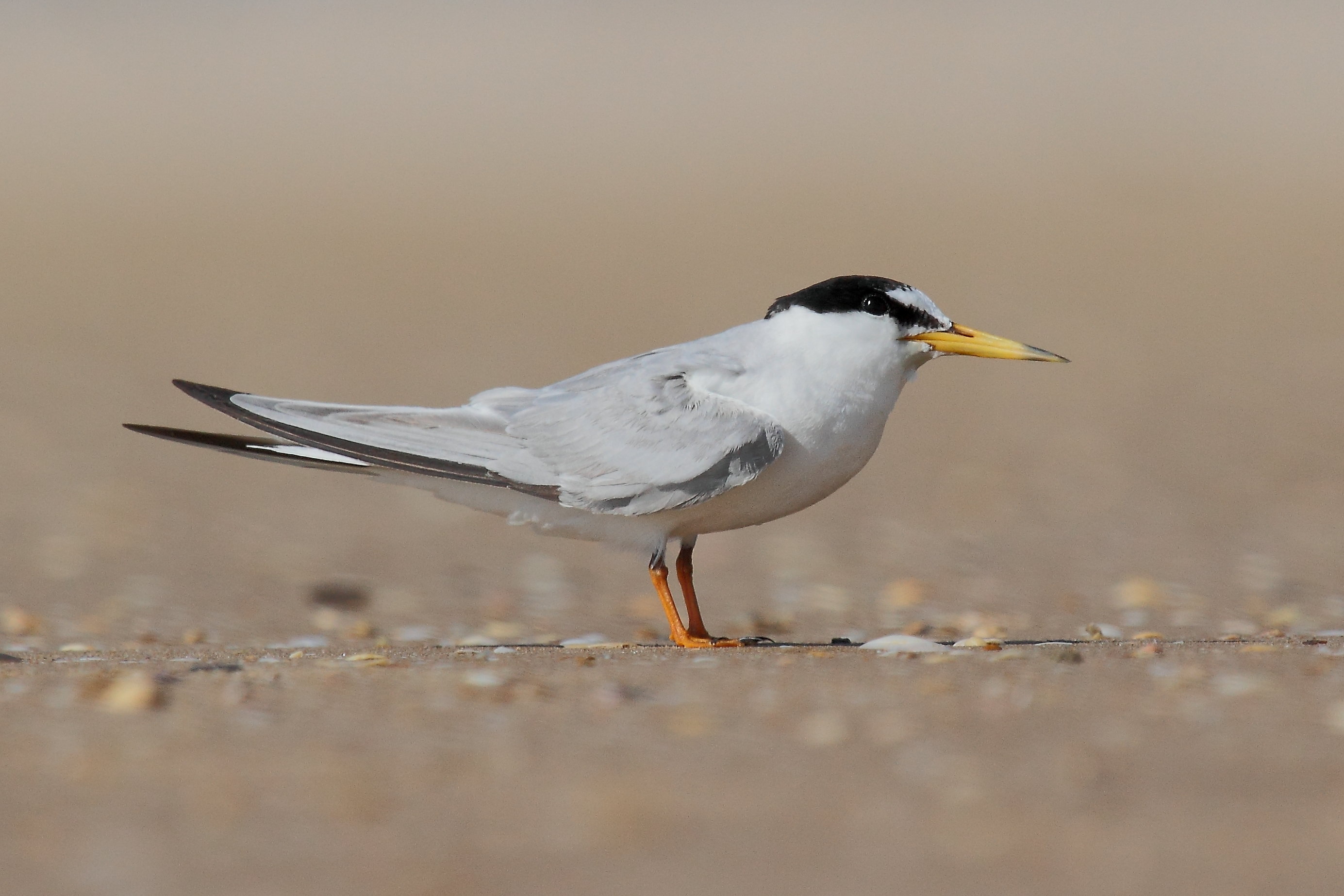 Charrancito Sternula albifrons, Parque Natural Bahía de Cádiz, España.